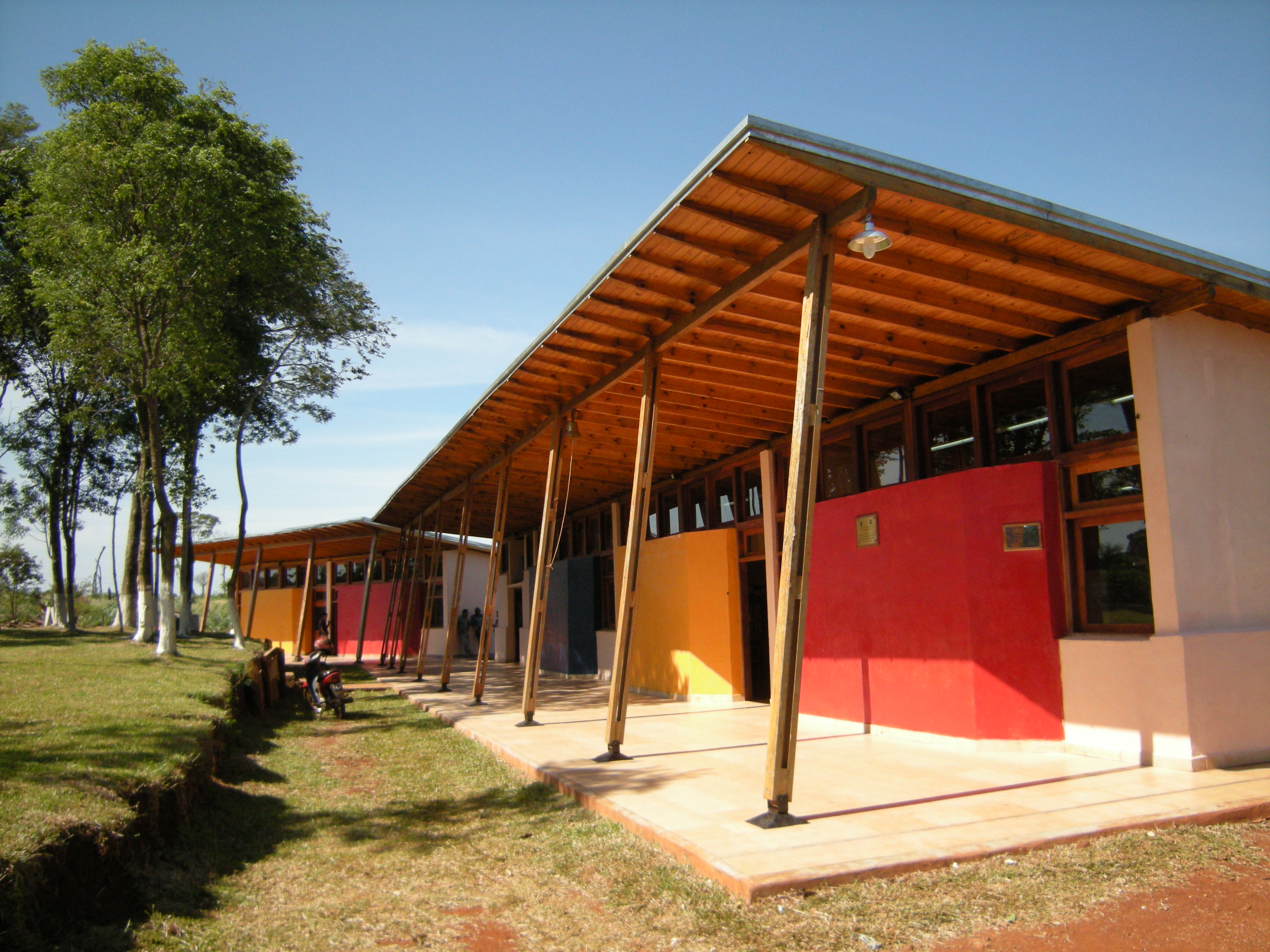 Escuela rural N° 892, “ex Andrés Guacurarí”, actual San Juan Bosco. El arquitecto Pablo Lavaselli obtuvo en 2010 el premio Bienal de la Sociedad Central de Arquitectos (SCA-CPAU) por esta obra. Se halla en el Departamento San Pedro, en la Provincia de Misiones, Argentina.